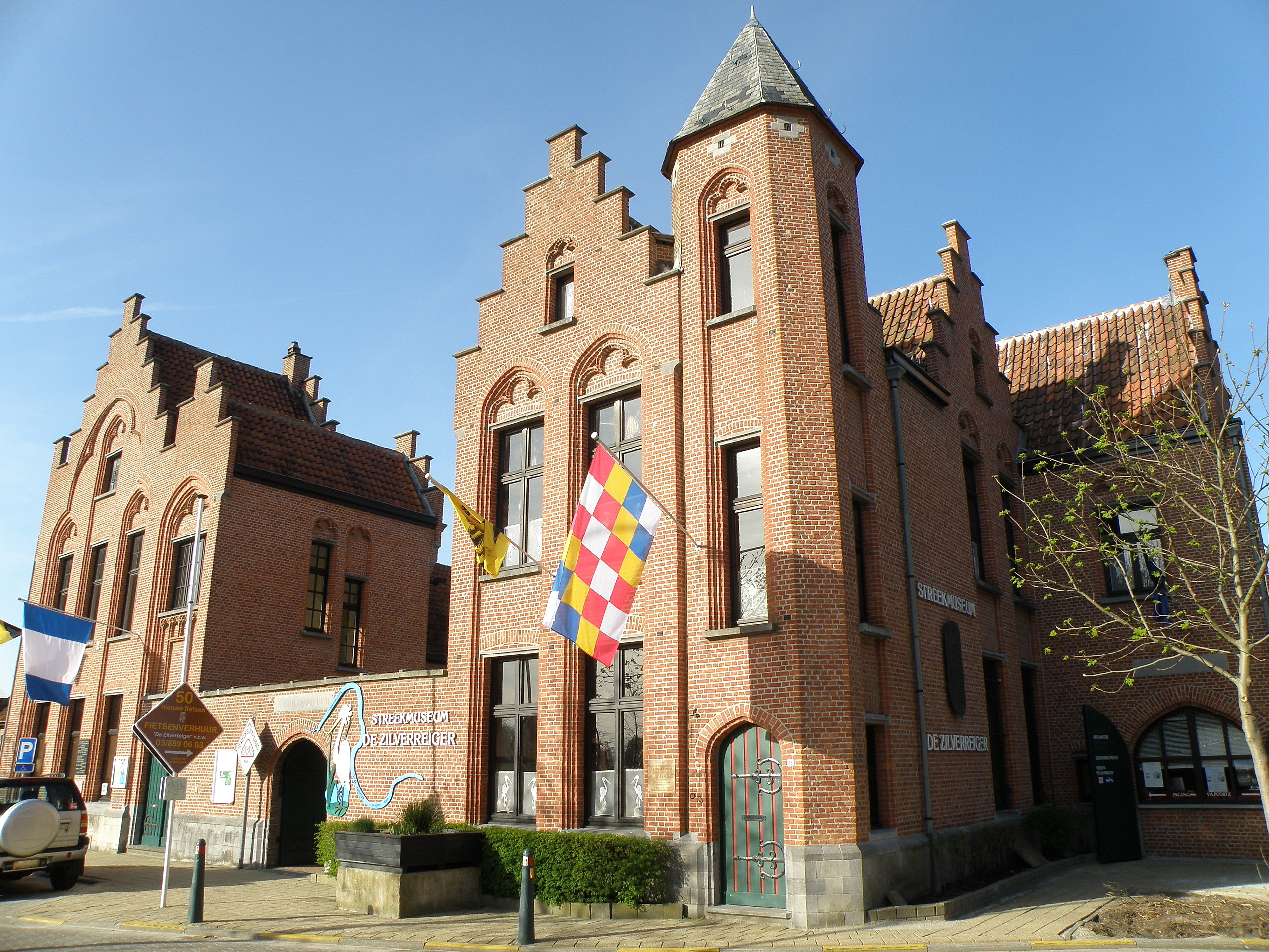 Weert, deelgemeente van Bornem, prov. Antwerpen, België. Neogotisch complex bestaande uit voormalig gemeentehuis (links, thans "ontmoetingscentrum") en schoolhuis (rechts, thans streekmuseum), n.o.v. architect Eduard Careels, 1907.